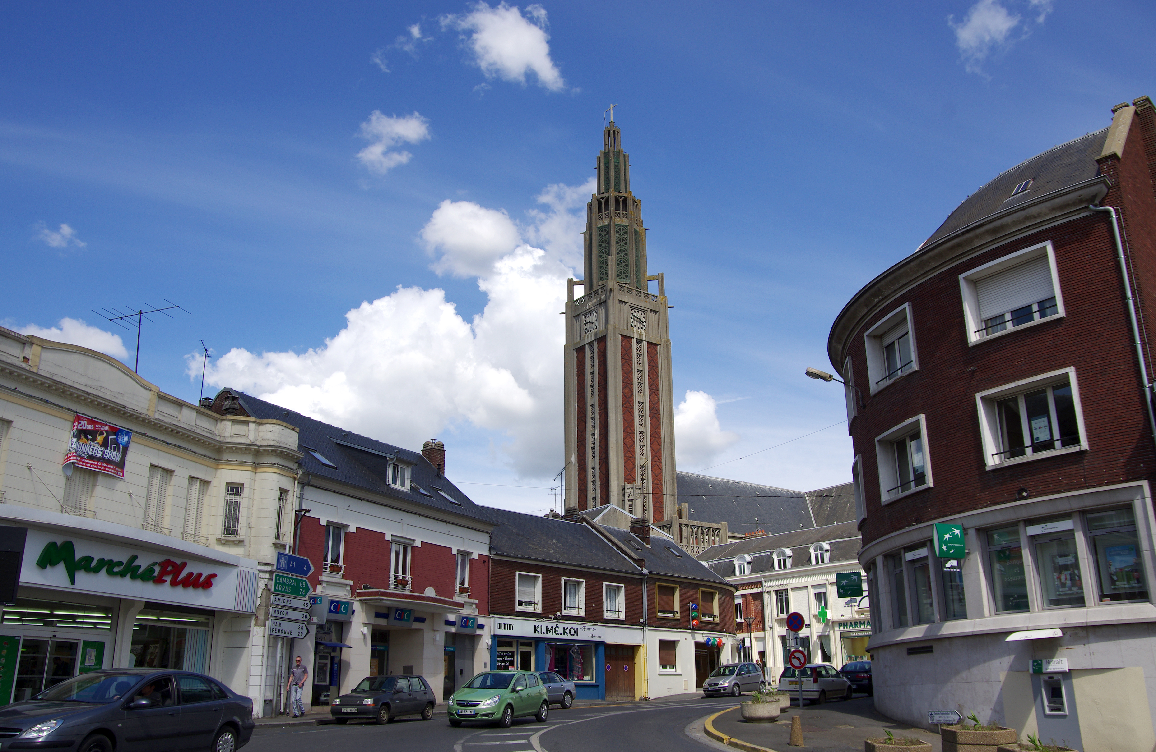 Roye (Somme, France) - L'église Saint-Pierre, vue depuis l'angle de la place de l'hôtel-de-ville. .